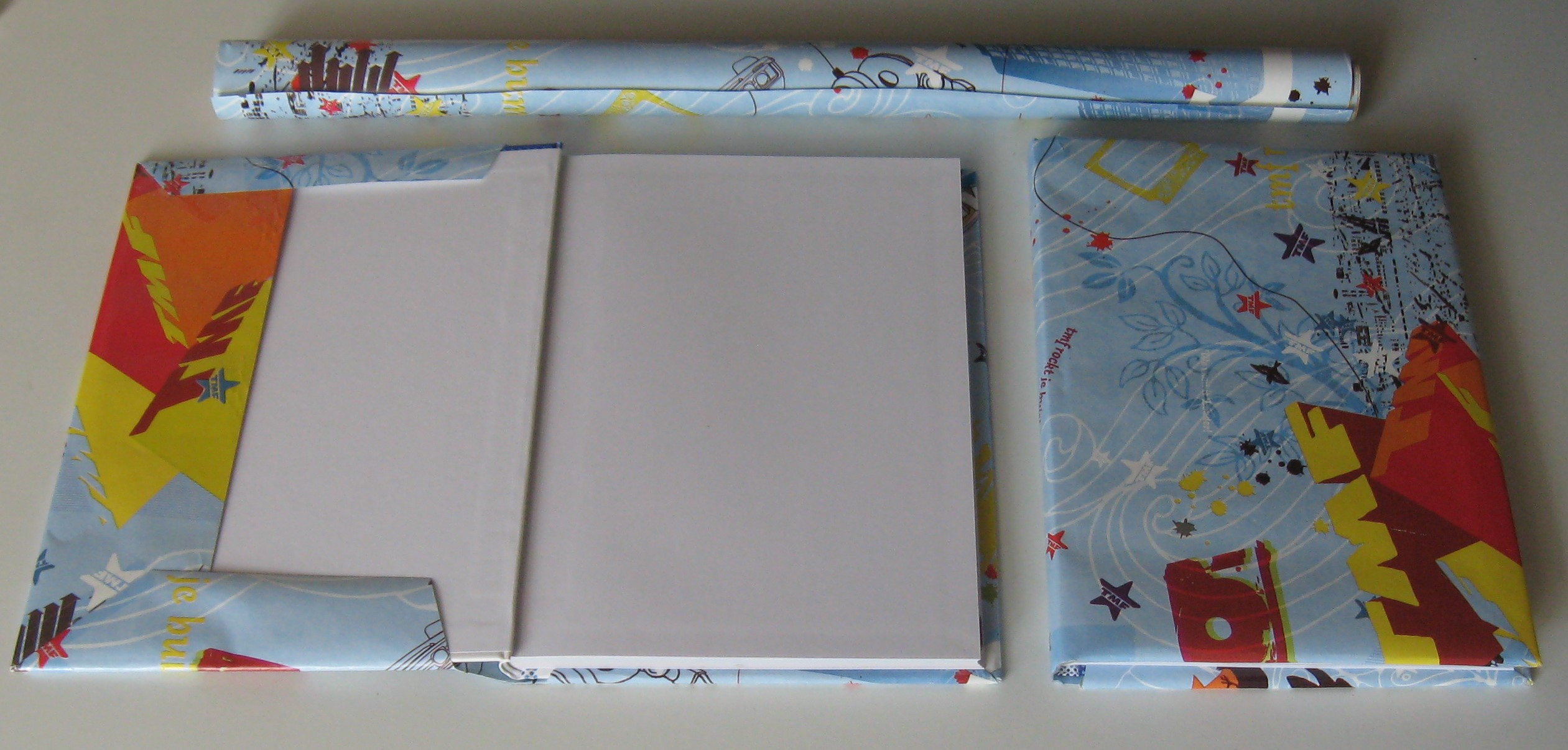 Op de voorgrond liggen twee gekafte boeken; een opengeslagen en de andere gesloten. Op de achtergrond ligt een rol kaftpapier.